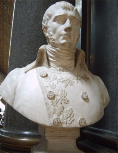 buste de Barthélémi Catherine Joubert dans la galerie des batailles du château de Versailles